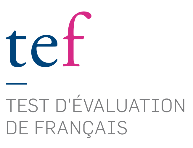 Logo du Test d'évaluation de français. 粵語: 法文水準測試標誌。